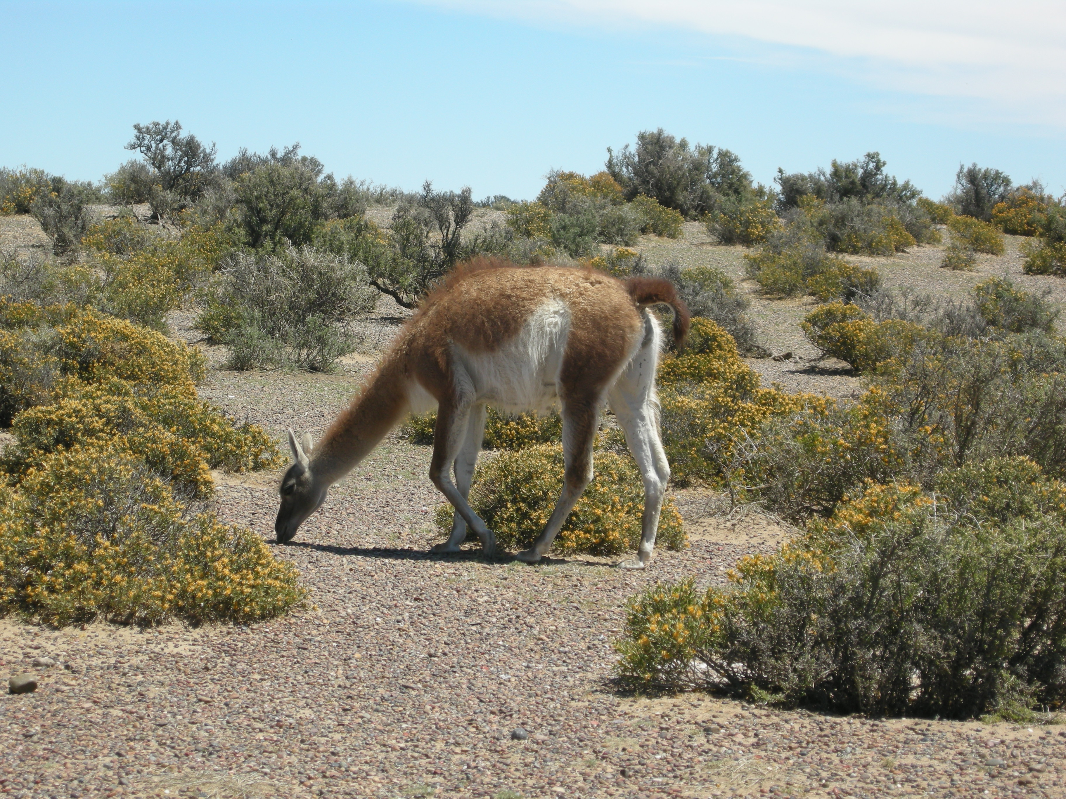 Guanaco adulte, photographié sur la péninsule Valdez (Patagonie, Argentine).